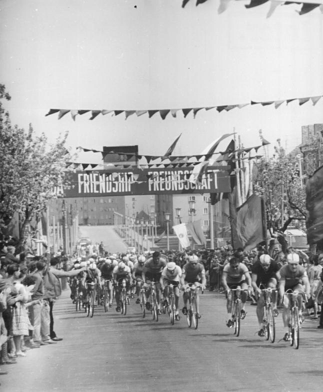 Friedensfahrt, Eisenhüttenstadt, Fahrerfeld ADN-ZB Wendorf Ks-Schm 14.5.1960 - XIII. Friedensfahrt 1960 - 10. Etappe von Frankfurt-Oder nach Dresden am 13.5.1960. UBz: Hagen (DDR), Pingel (Dänemark), Covens (Belgien) und Schur (DDR) an der Spitze des Feldes in Eisenhüttenstadt.